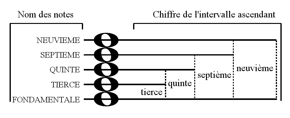 Description : Nom des notes d'un accord Source : Personnelle Licence : GFDL